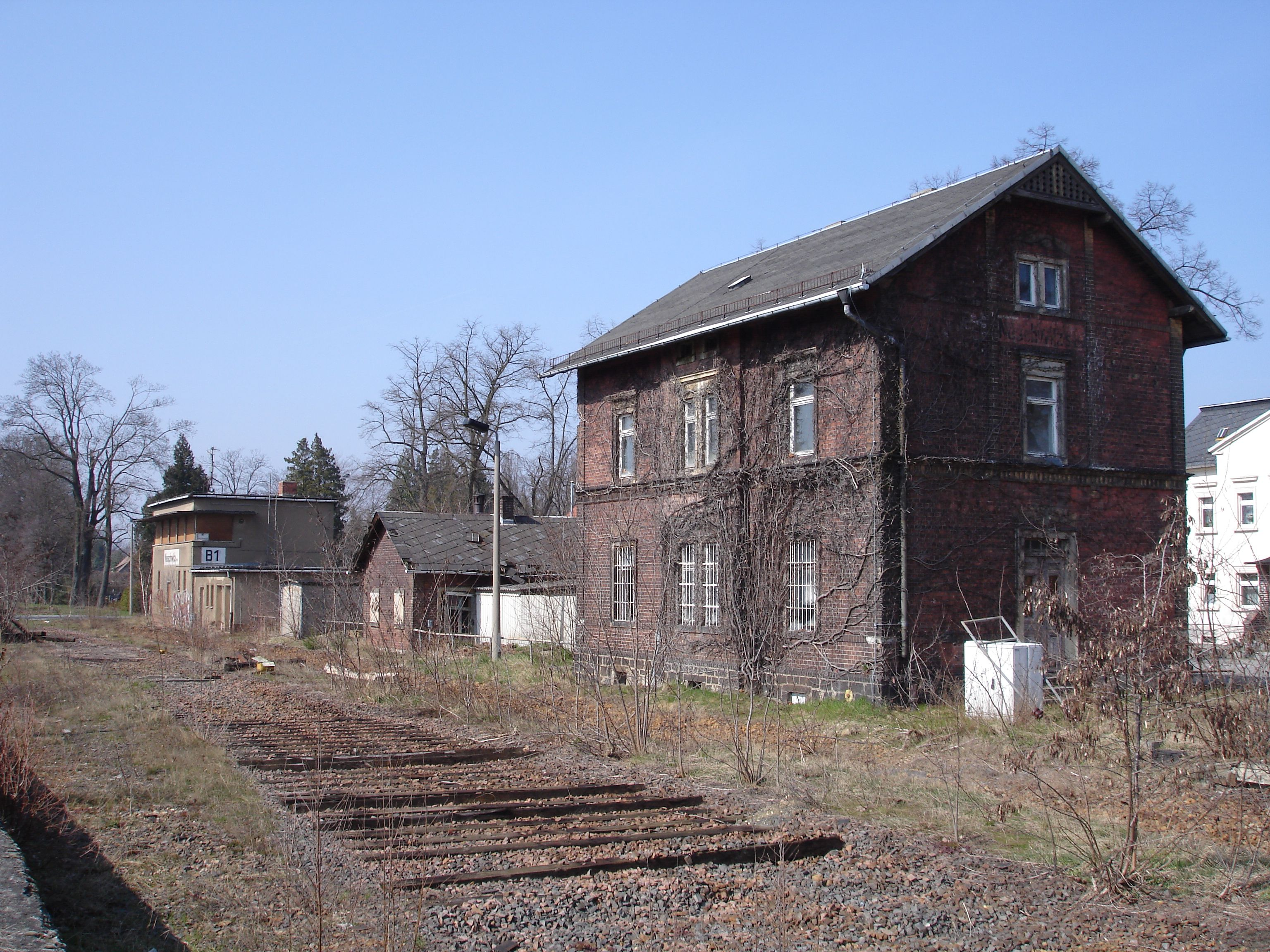 Bahnhof Neschwitz Hornjoserbsce: Něhdyše dwórnišćo w Njeswačidle